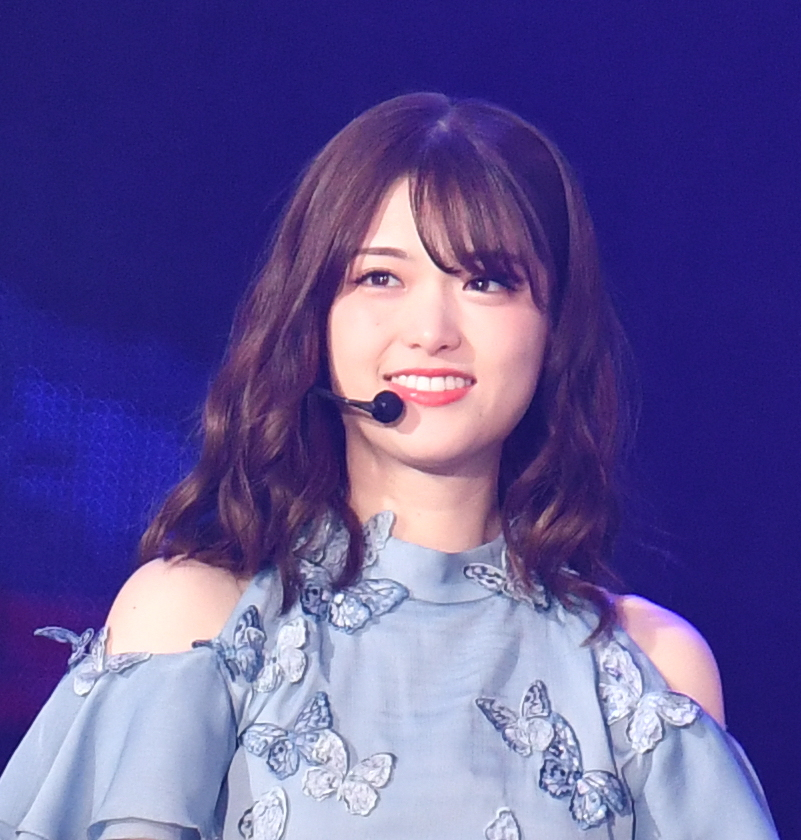 2019.01.26「第14回 KKBOX MUSIC AWARDS in Taiwan」乃木坂46 @台北小巨蛋